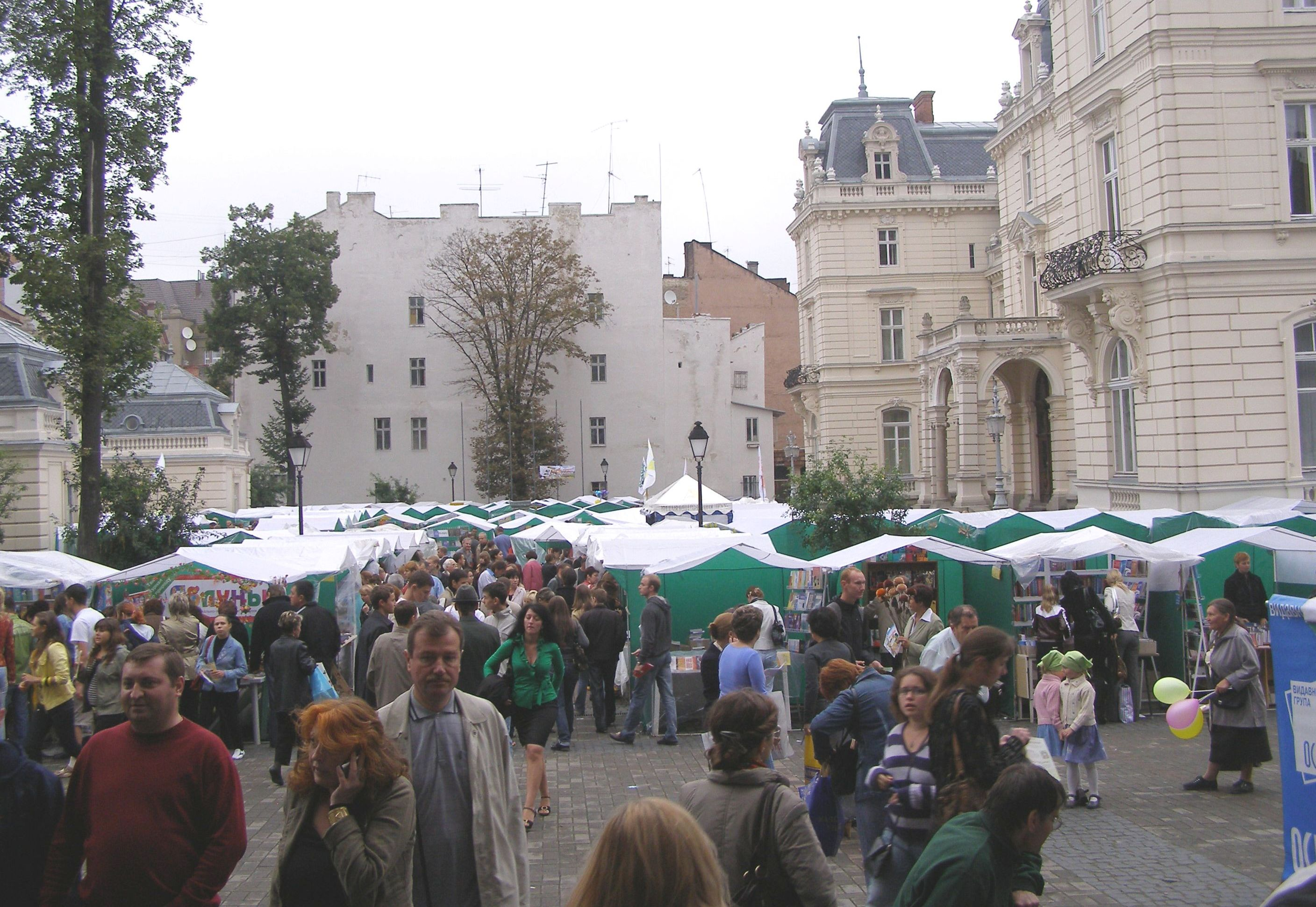 Lemberger Buchforum 2008